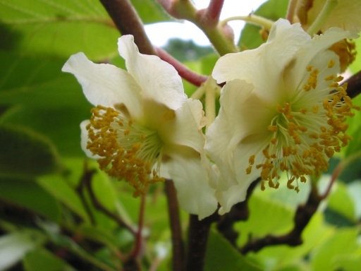 Actinidia en fleurs, , Dieppe